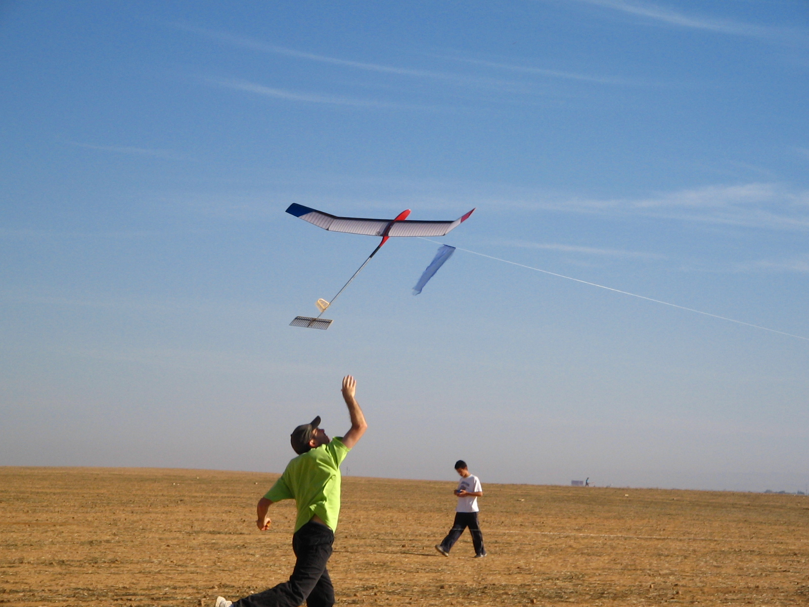 F1A air model launch